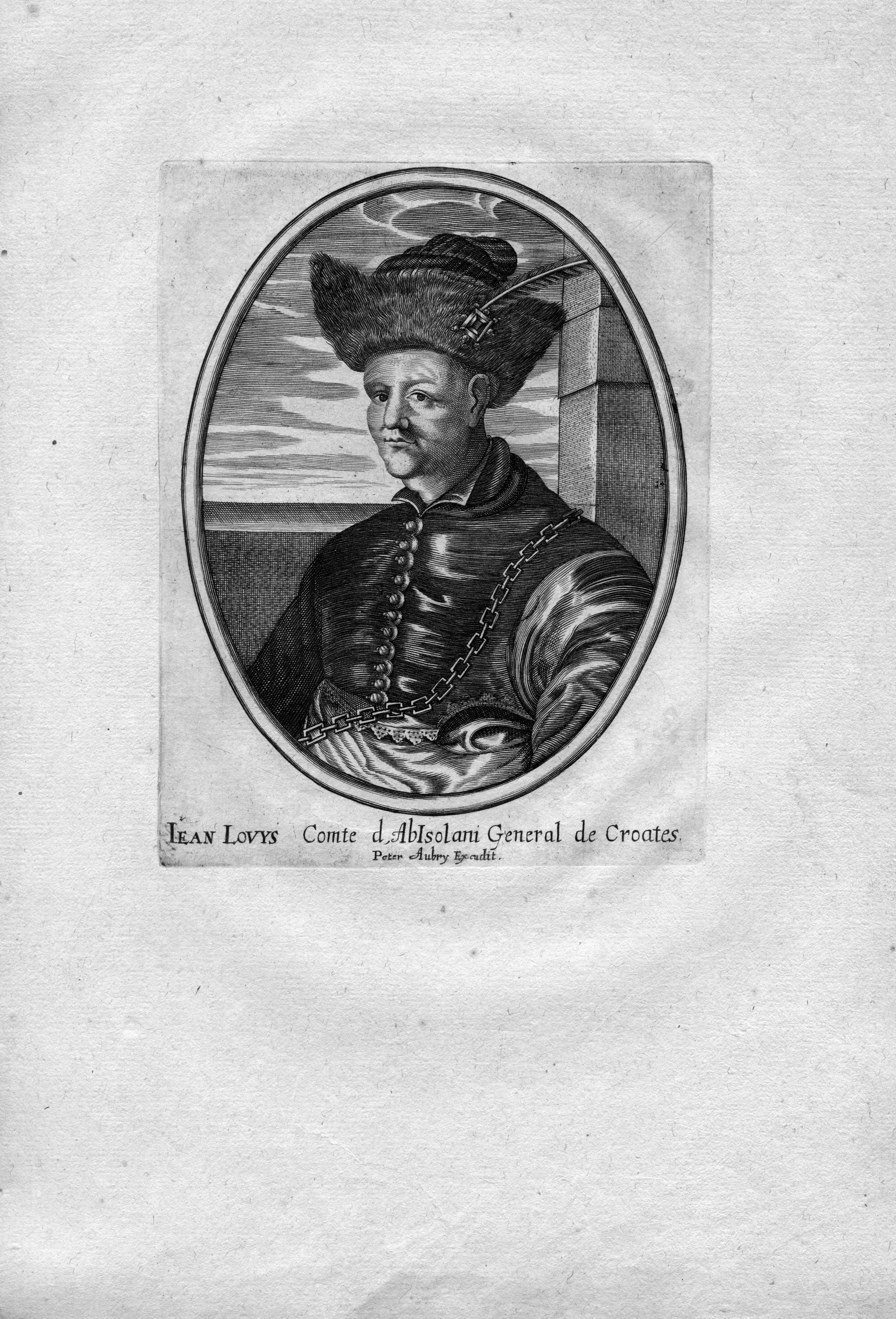 Peter Aubry - Johann Ludwig Isolani, Stadtbibliothek Trier, Signatur: Port 1857.